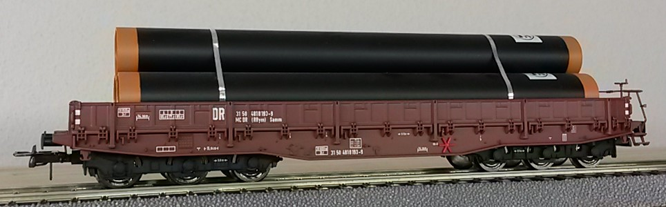 Modell eines sechsachsigen Flachwagens der DR, Gattung RRym, Dok.-Nr. 0782